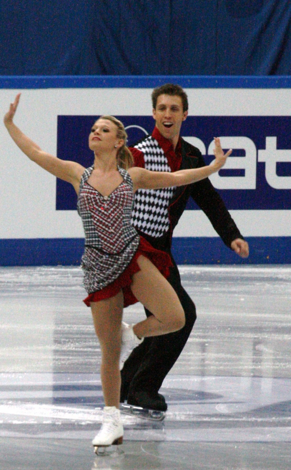 Кирстен Мур-Тауэрс и Дилан Москович (Канада) на финале Гран-при 2012-2013. Короткая программа.